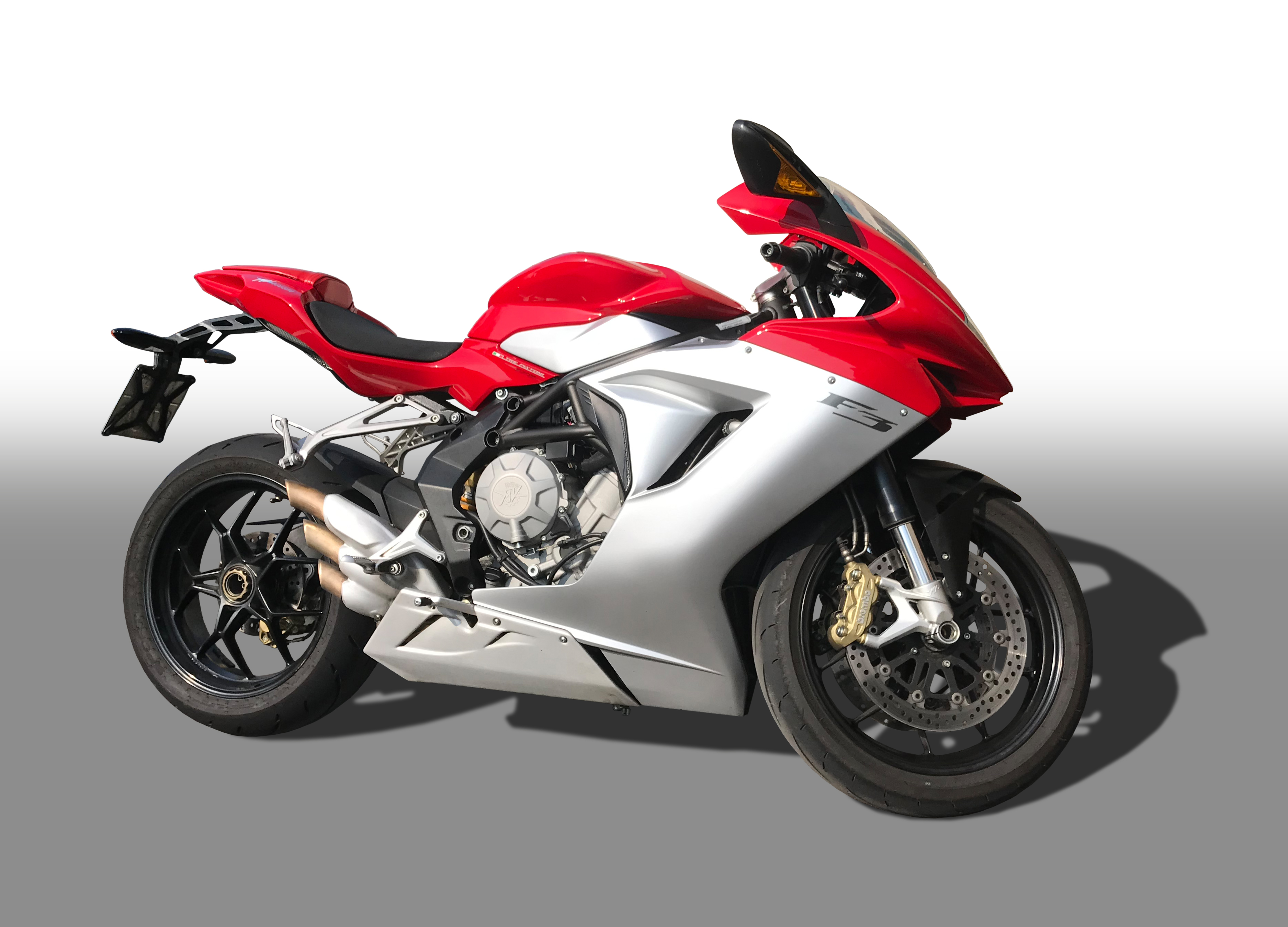 MV Agusta F3